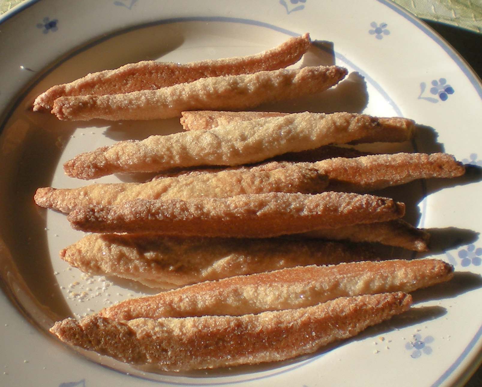 Zézettes de Sète.